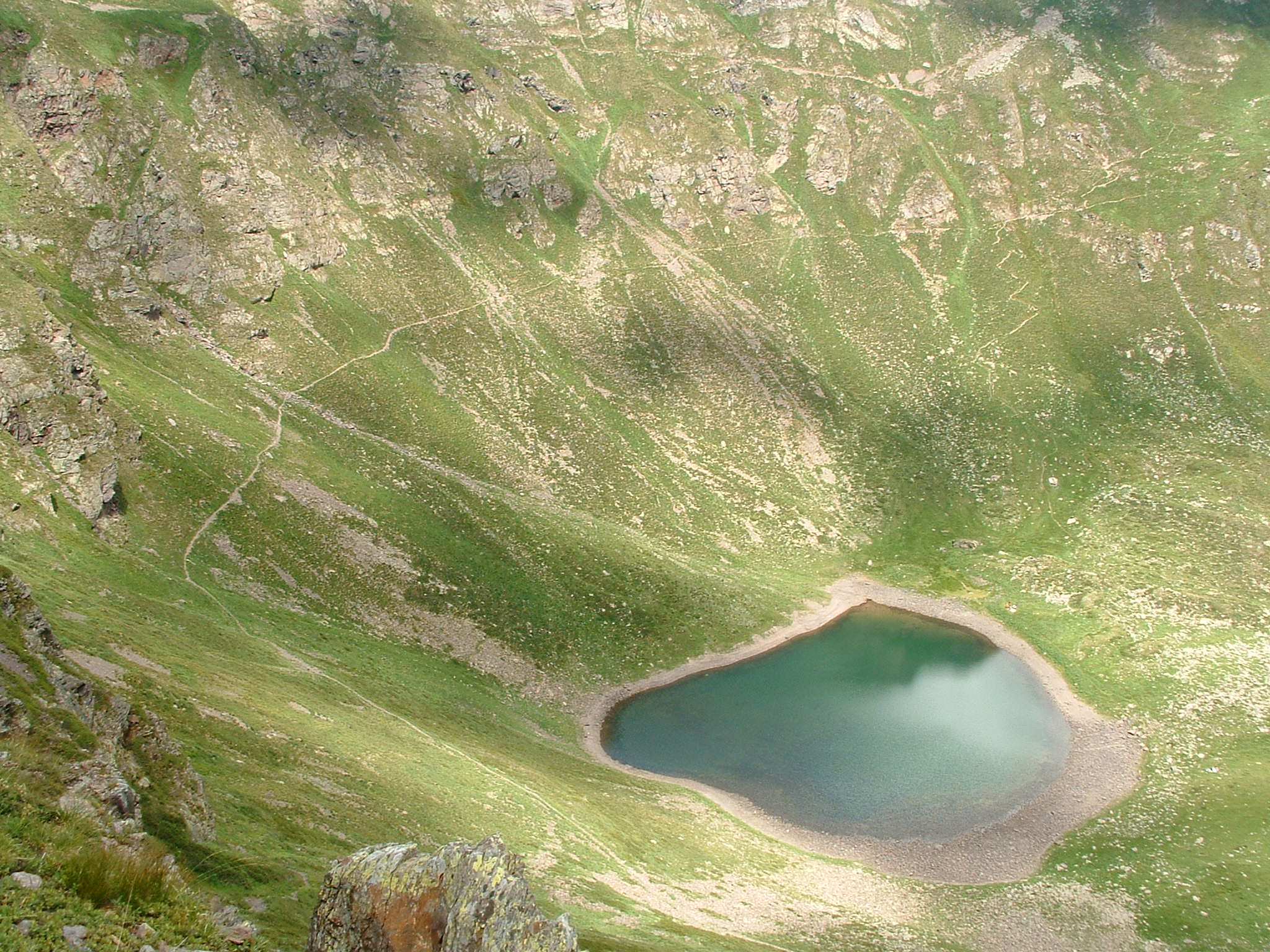 fatta da me Lago di Valbona, Schilpario (BG)